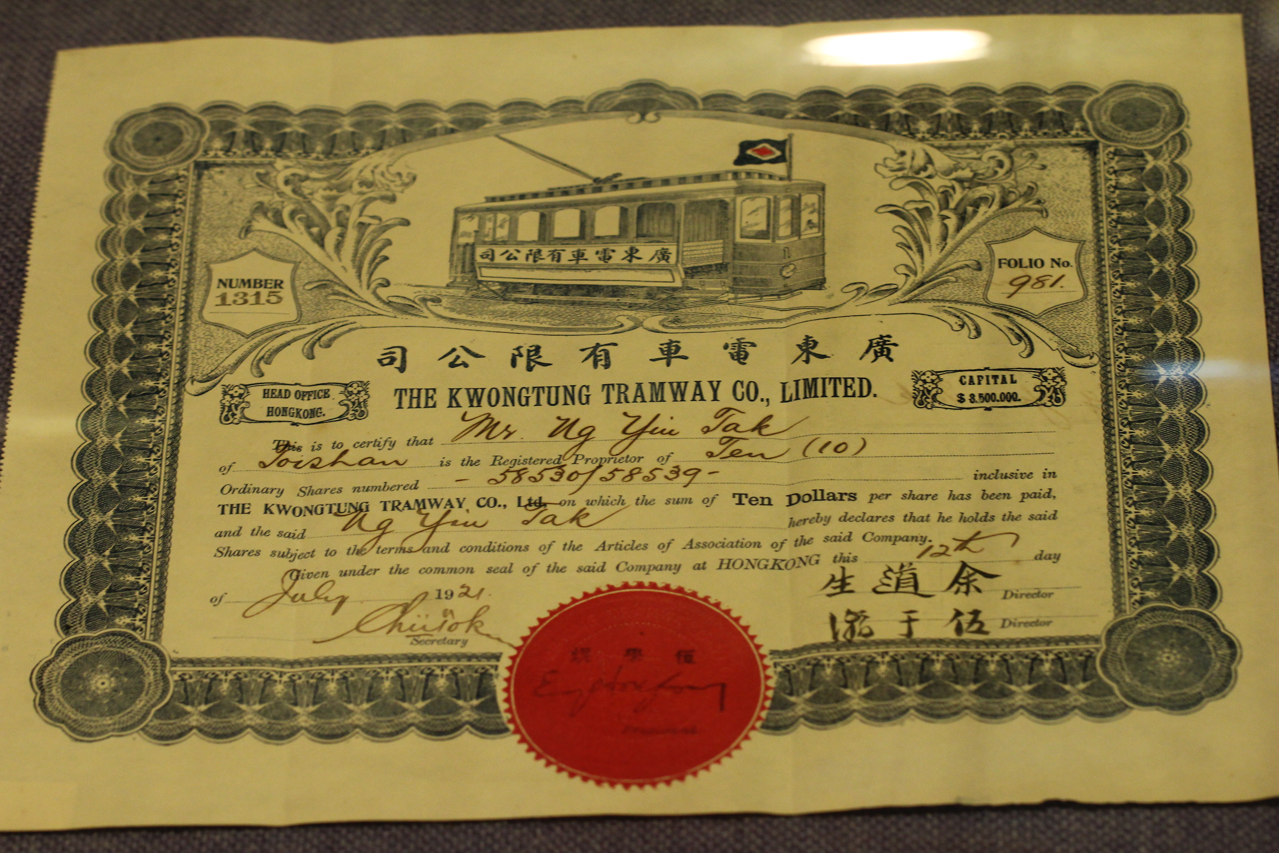 廣東電車有限公司（原廣州電車路公司），「廣東」的英文以粵音拼寫「Kwongtung」。